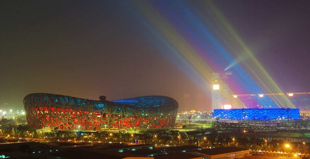 北京国家体育场夜晚（奥运时）